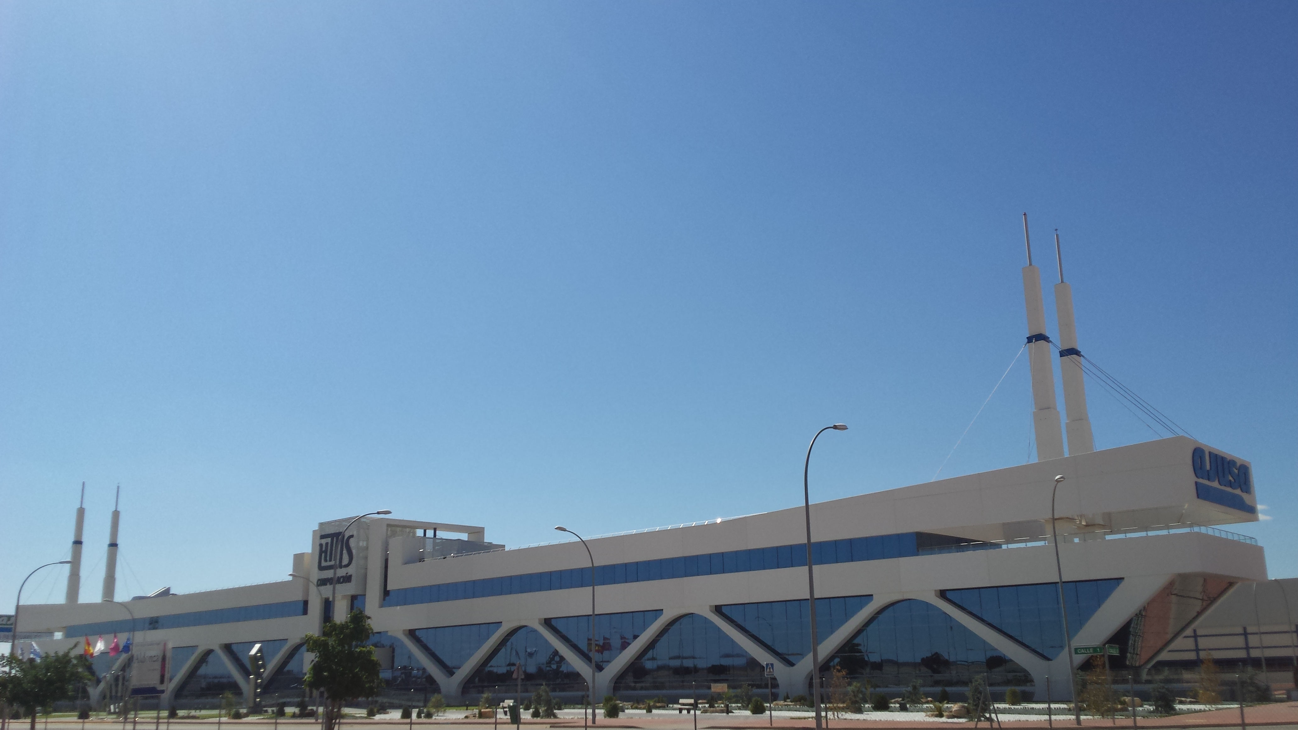 Sede social de la Corporación HMS (Ajusa). Parque Empresarial Ajusa. Albacete